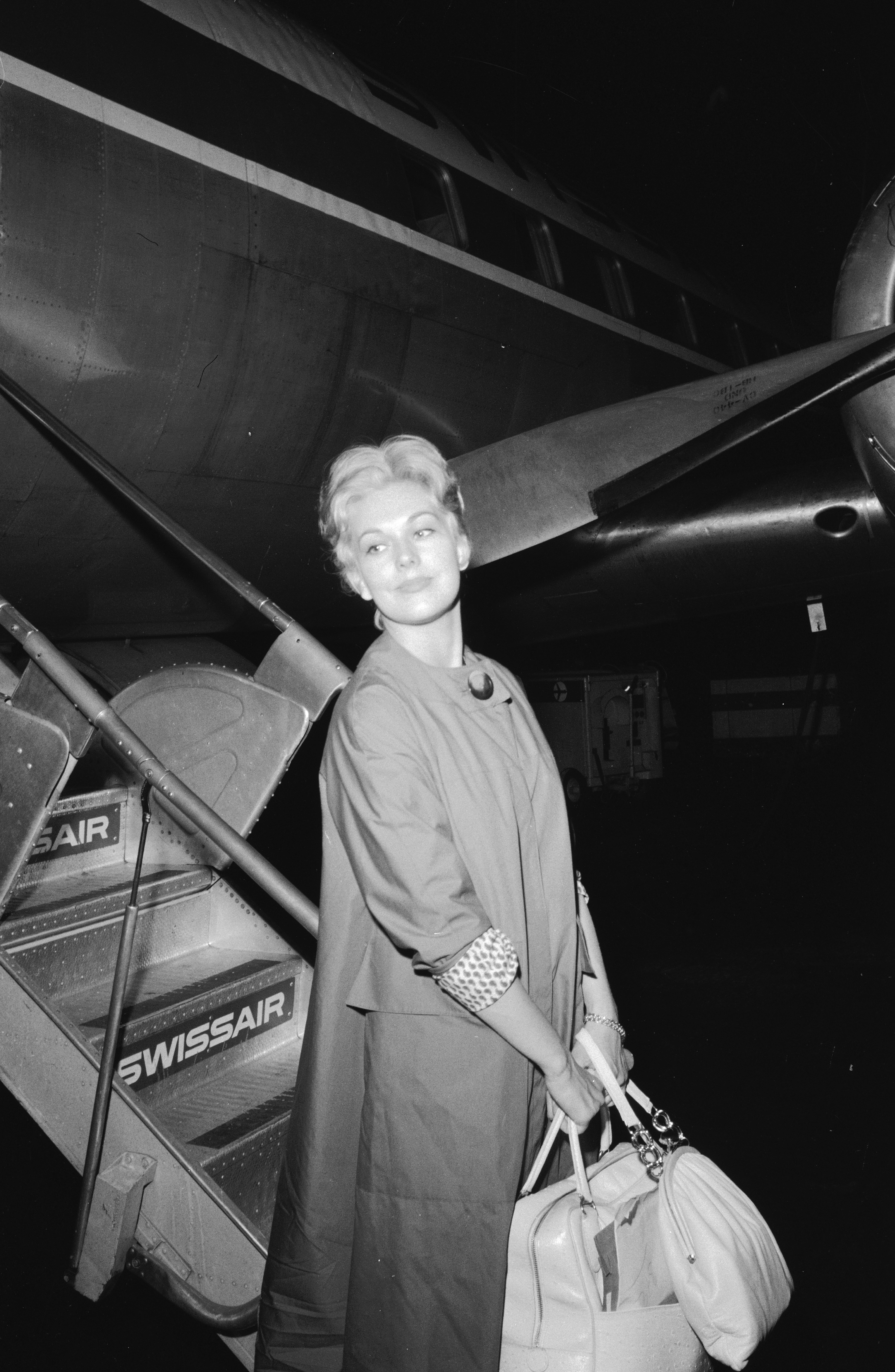 Kim Novak, Ankunft am Flughafen Zürich-Kloten